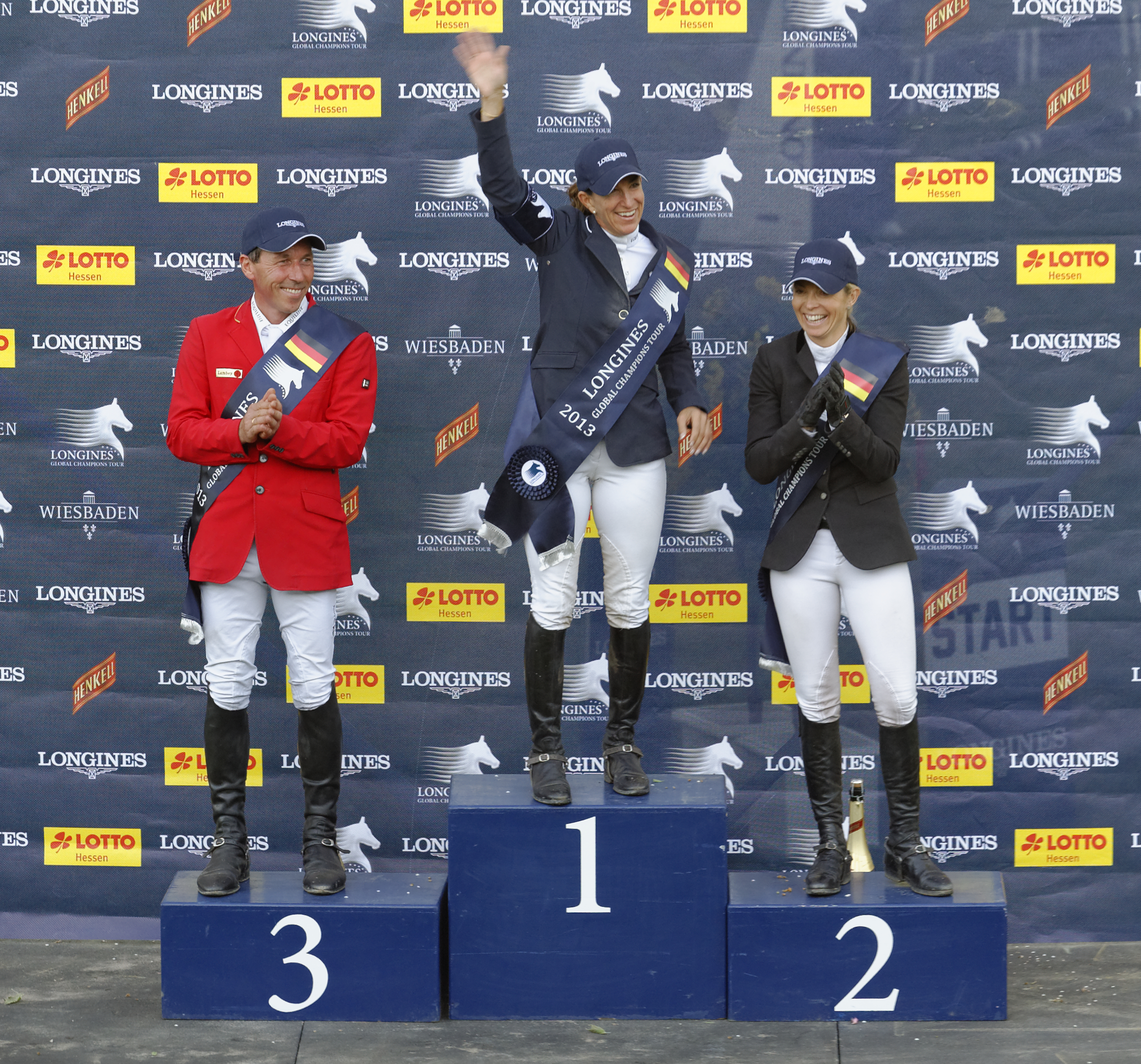 Internationales Pfingstturnier Wiesbaden 2013